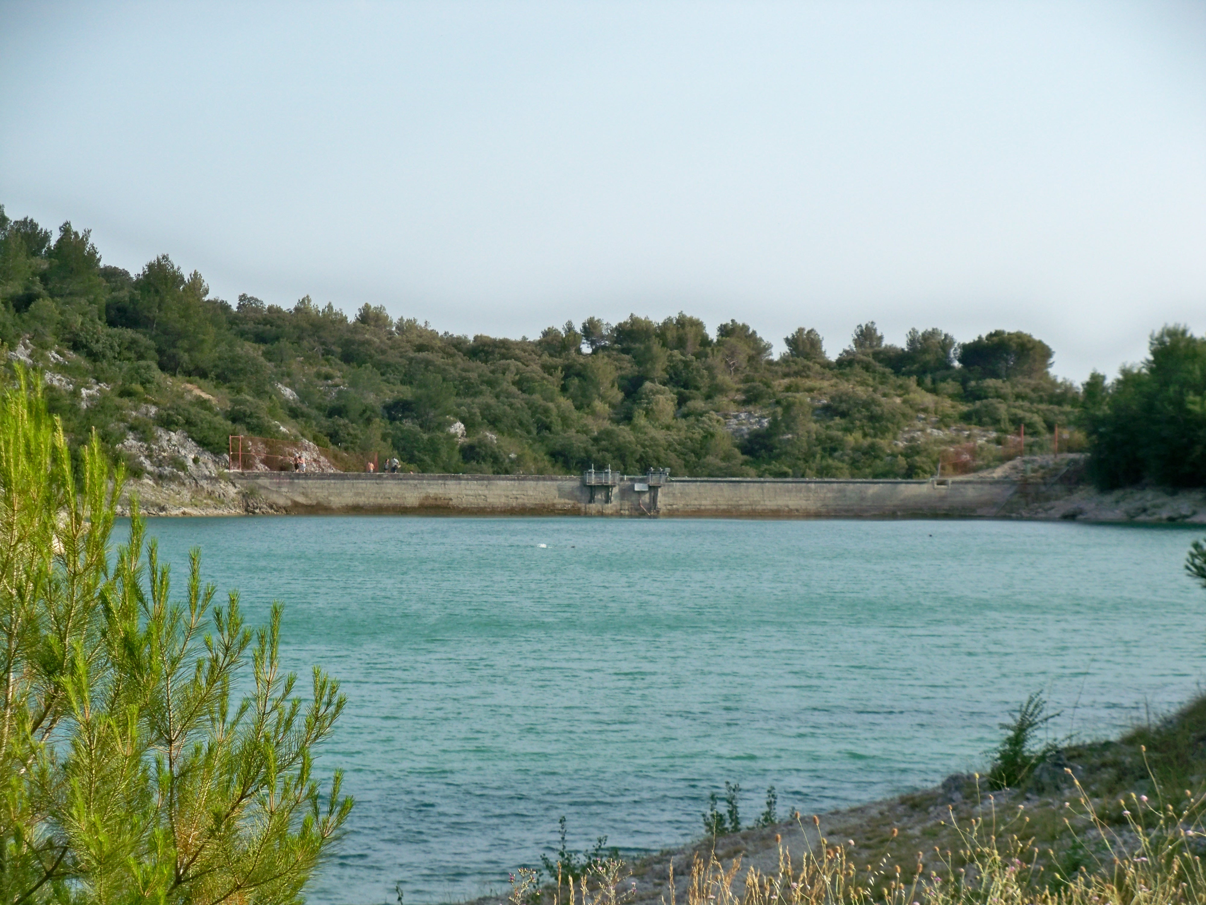 Barrage du Lac du Paty, Caromb, Vaucluse, France